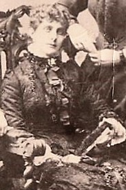 María del Carmen Mackenna Serrrano, esposa de Adolfo Eastman Quiroga (Ovalle, 28 de octubre de 1835-Santiago, 9 de agosto de 1908) fue un ingeniero, empresario y político liberal chileno.